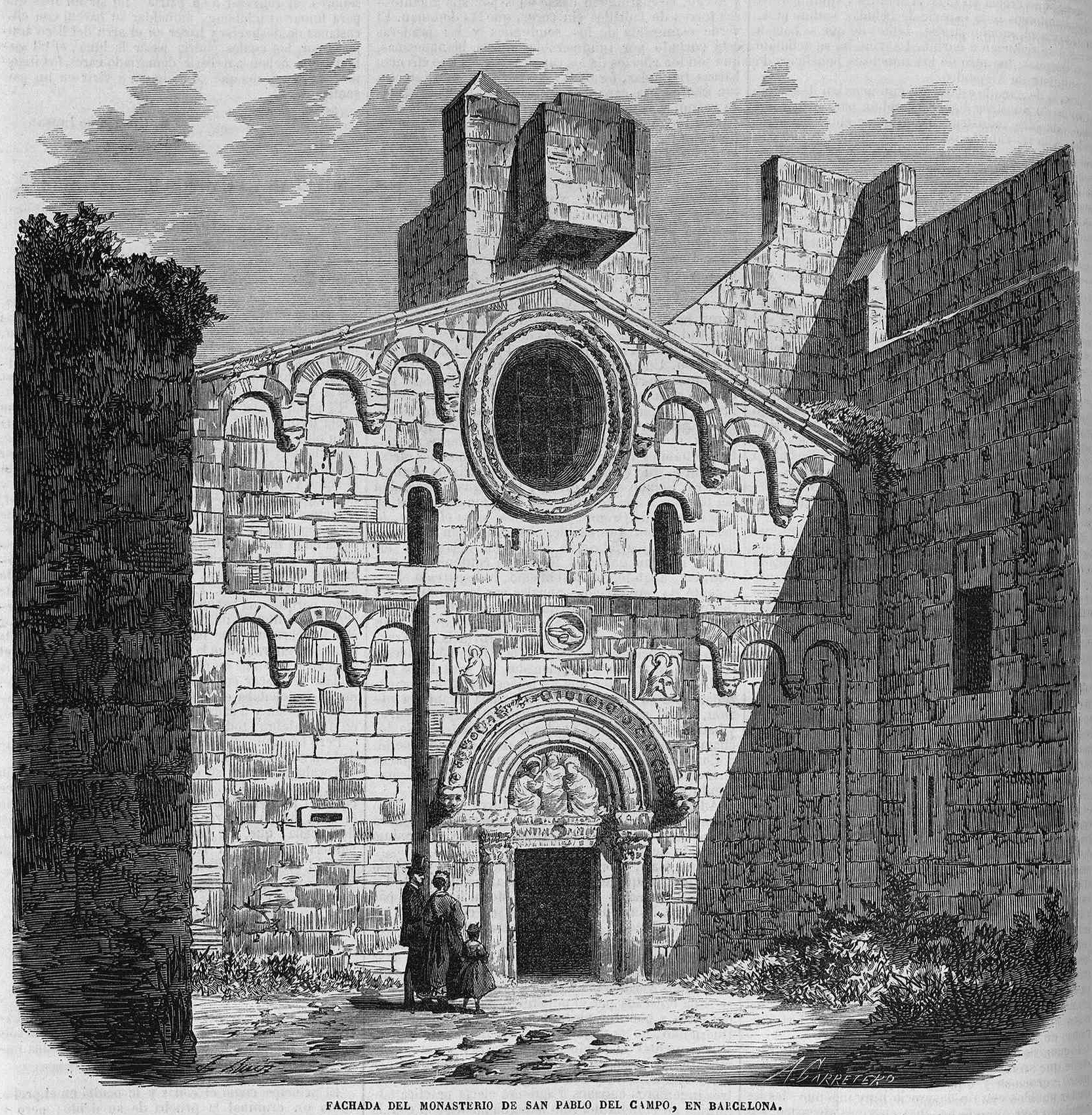 Fachada del monasterio de San Pablo del Campo, en Barcelona, en la revista española El Museo Universal.